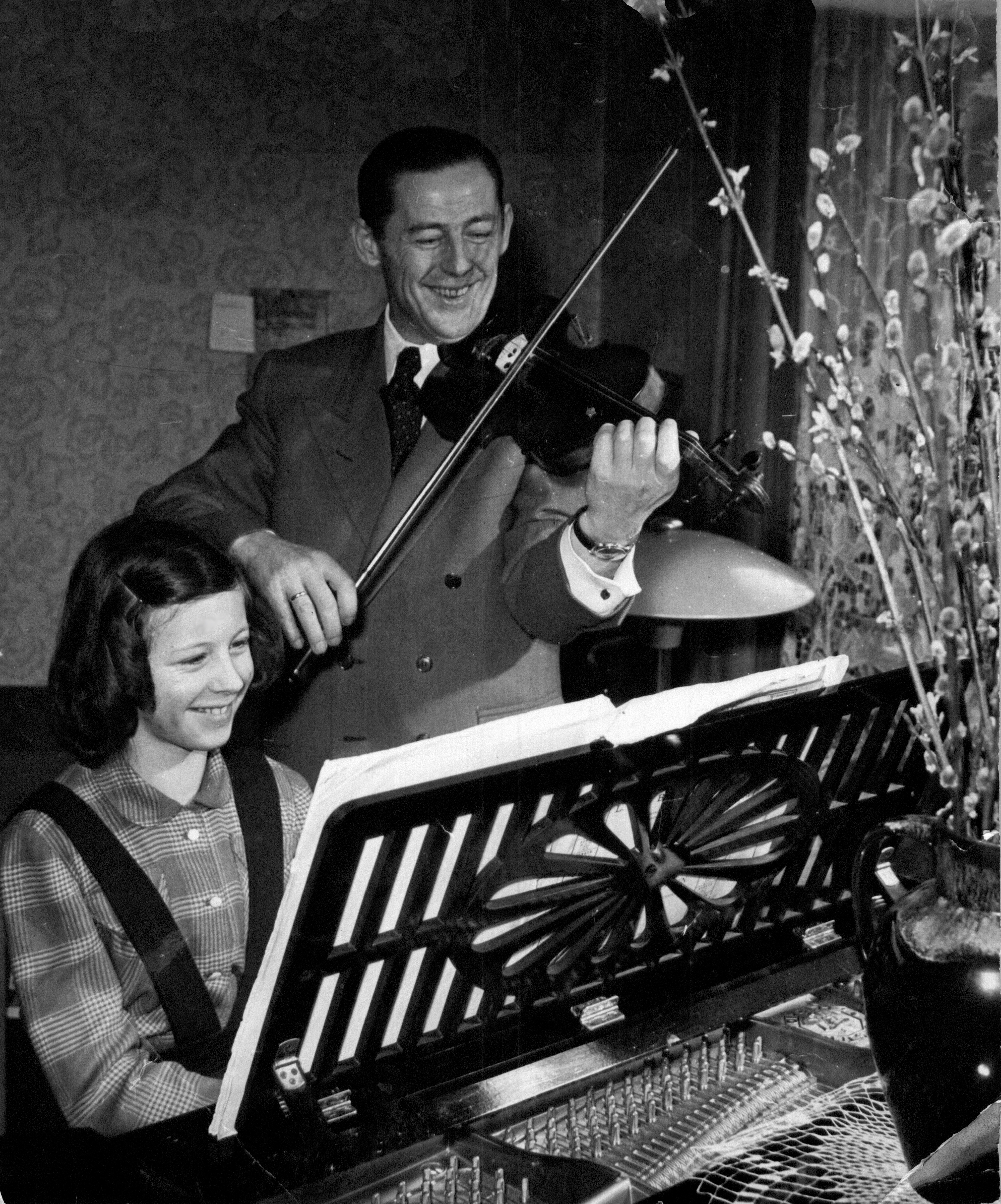 Erich Donnerhack musiziert mit seiner Tochter.